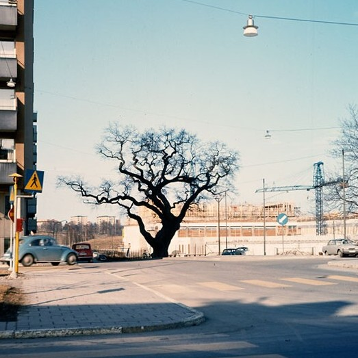 Den stora eken på Oxenstiernsgatan sedd mot TV-huset. TV-huset under byggnad.